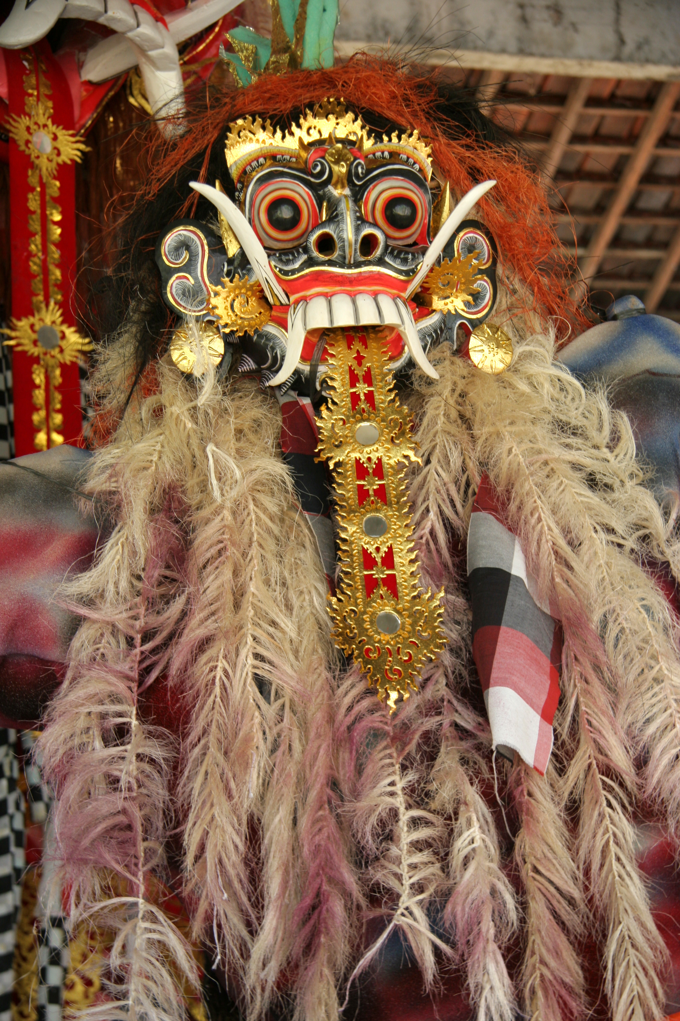 bali route d'ubud sculpture réalisée pour être brulée à la fête du nouvel an